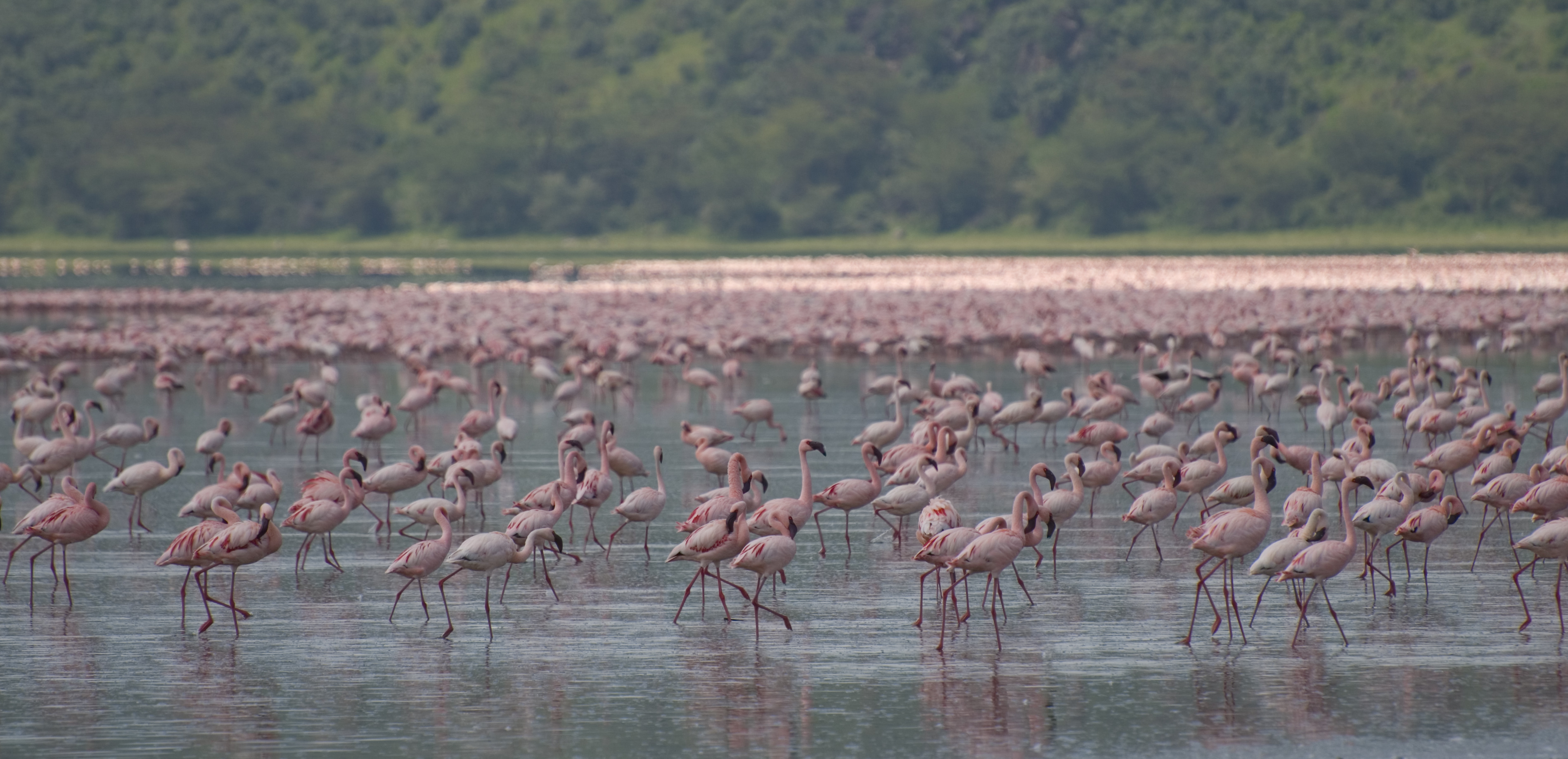 Lesser Flamingos on Lake Nakuru, Lake Nakuru National Park, Kenya